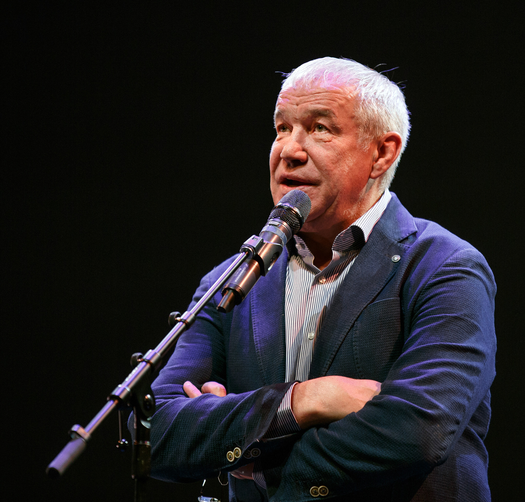 Сергей Гармаш. Актёр театра и кино. Фото с творческого вечера в Торонто (январь 2017)